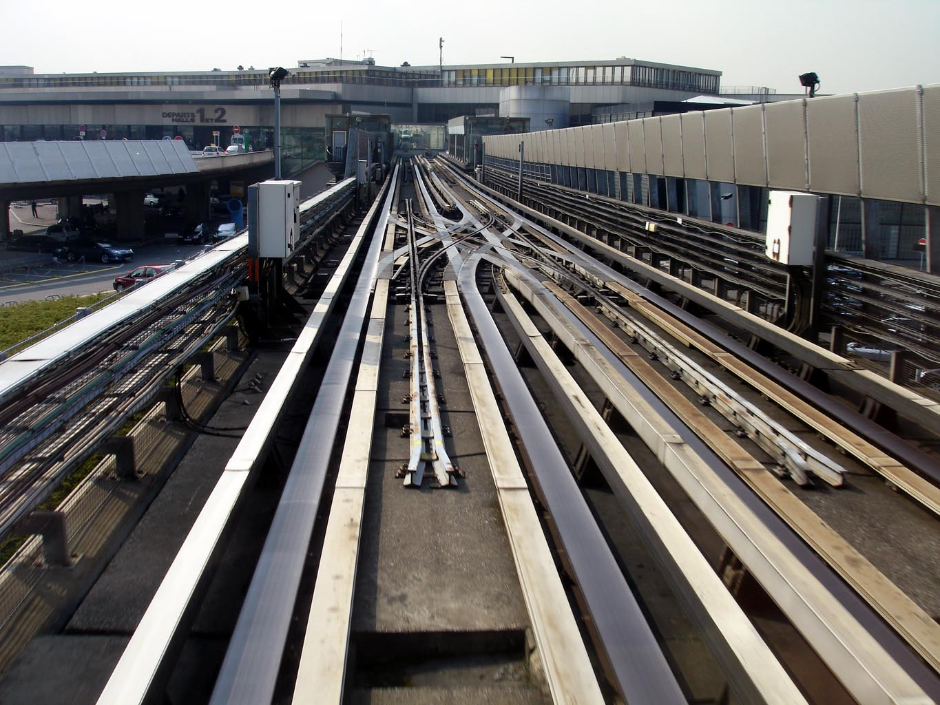 Aiguillage d'Orlyval, Orly-Ouest